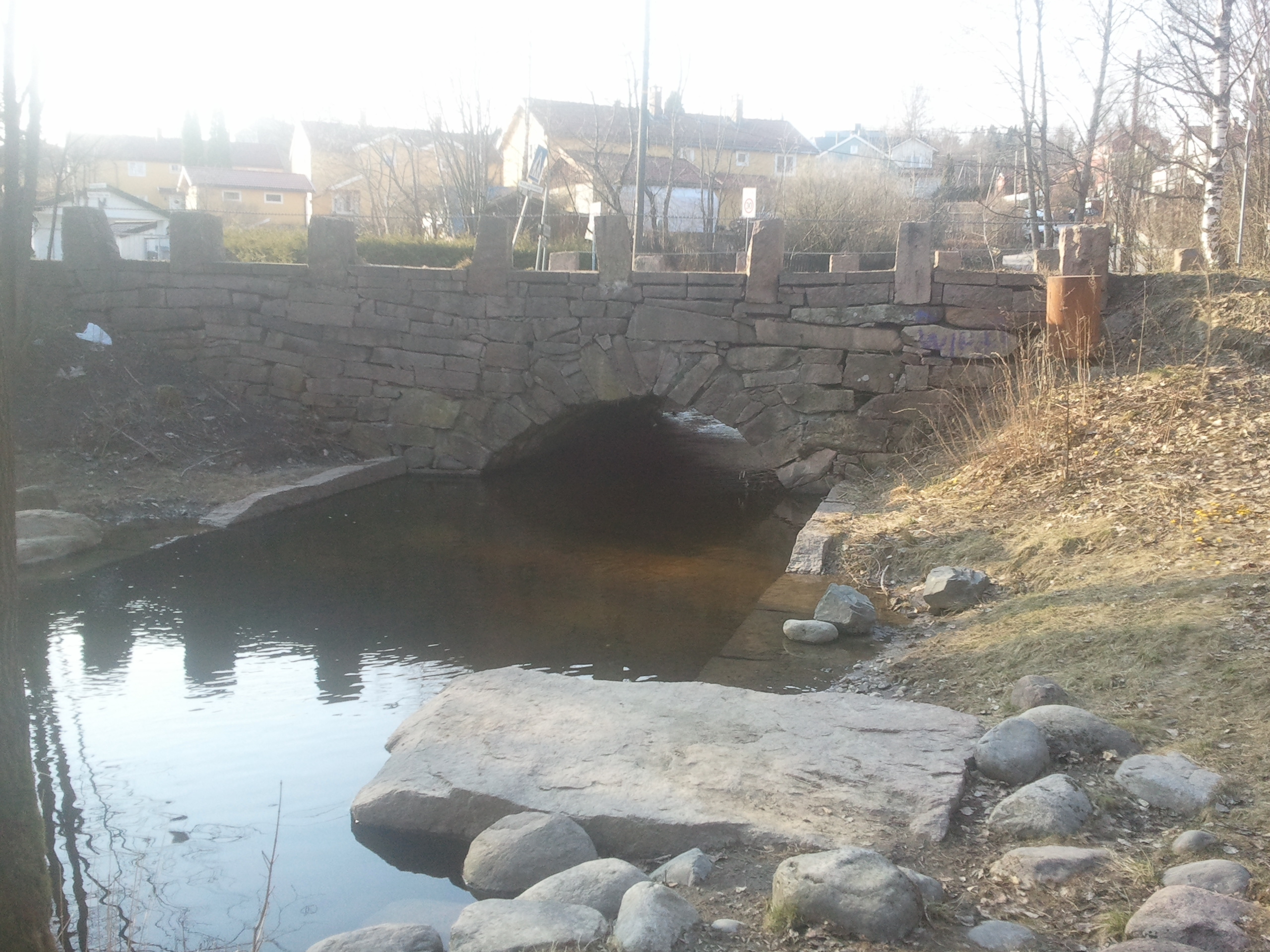 Steinhvelvbro der Kalbakkveien går over Alnaelva